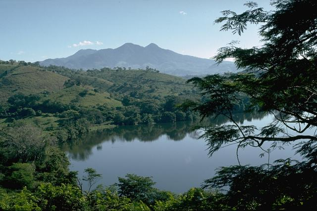 Moyuta volcano in Guatemala.